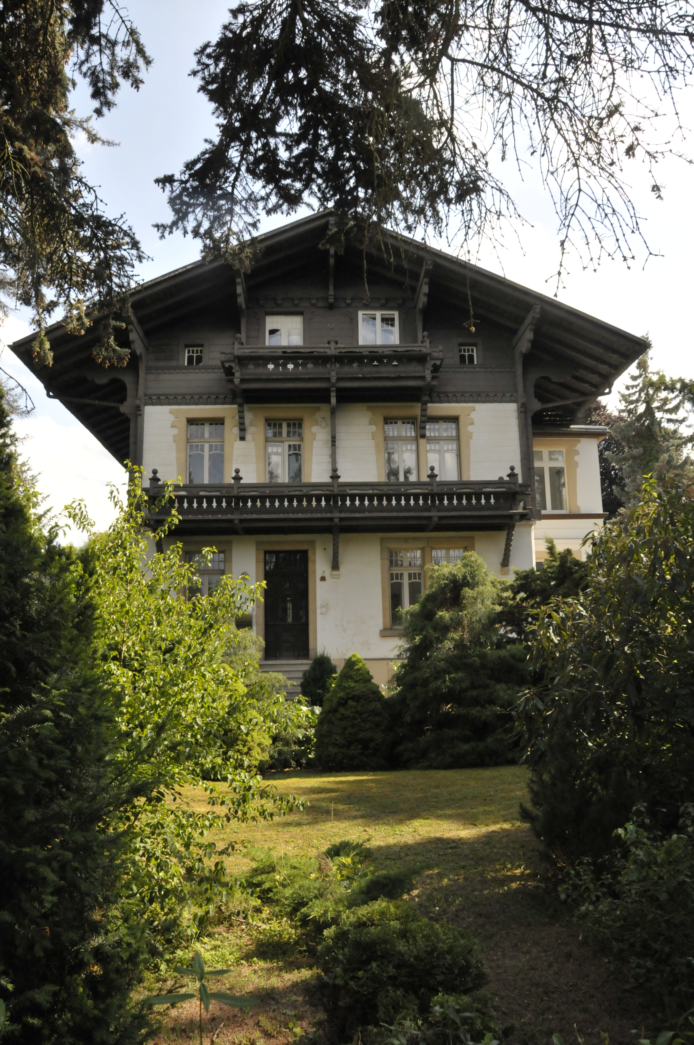 Gotha, Reinhardsbrunner Str. 83, das "Schweizerhaus", um 1900 Sommerwohnsitz von Philipp Harjes